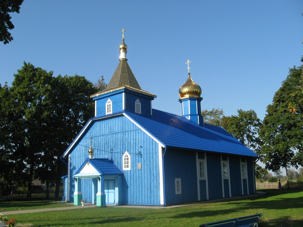 Пескі. Троіцкая царква